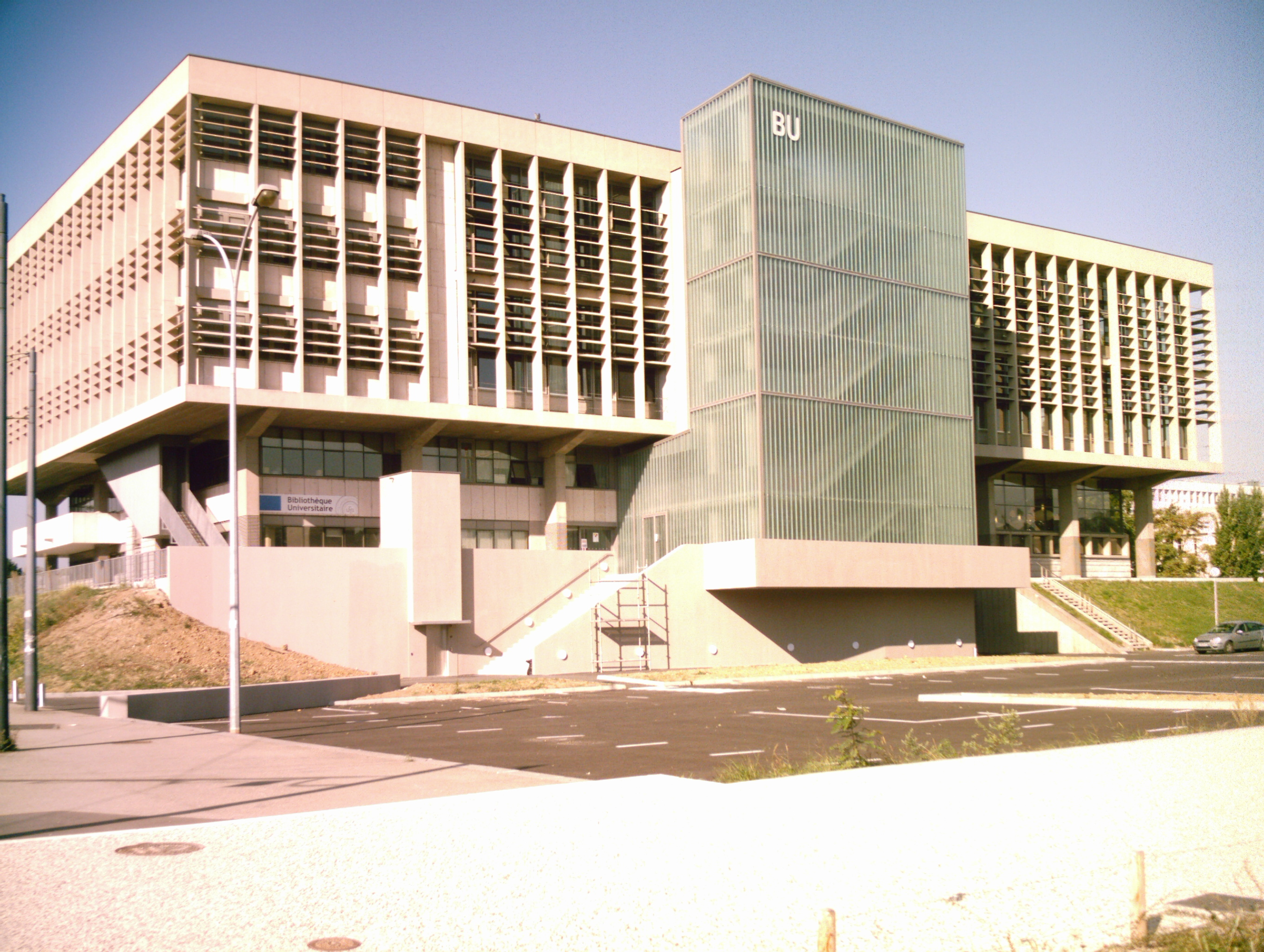 La bibliothèque universitaire de l'université Lyon I (campus de la Doua) après les travaux de rénovation. La Doua (Villeurbanne, France)